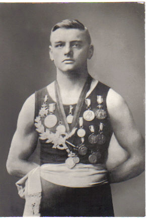 Jan Barrette worstelkampioen